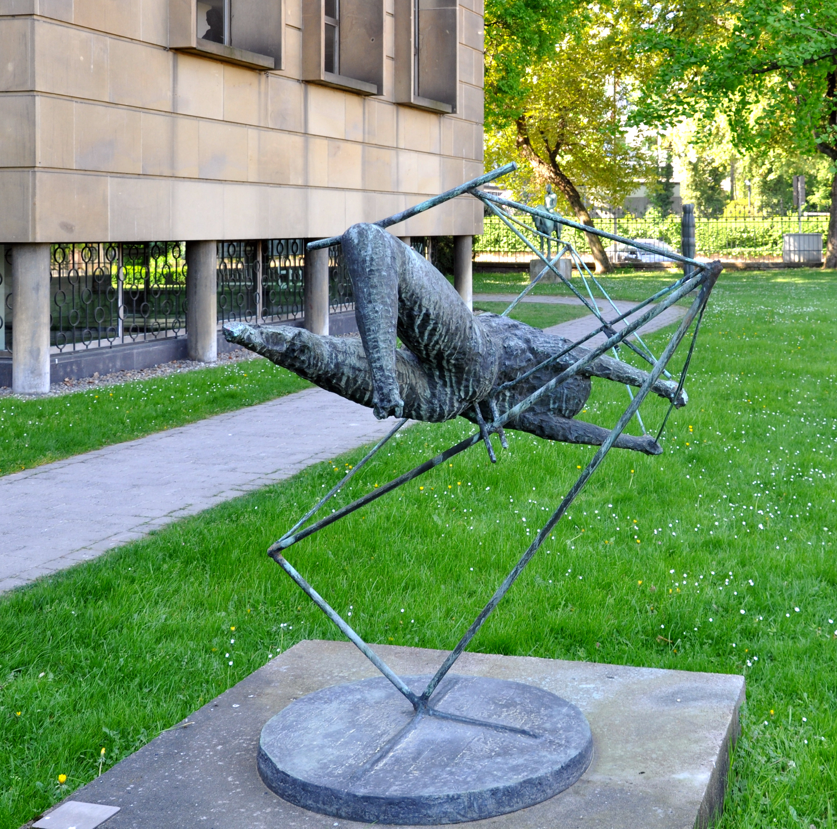 Frankfurt am Main, Skulpturengarten des Städel, Reg Butler (1913–1981): Frau im Raum, 1963, Bronze, Inv. Nr. SGP 207